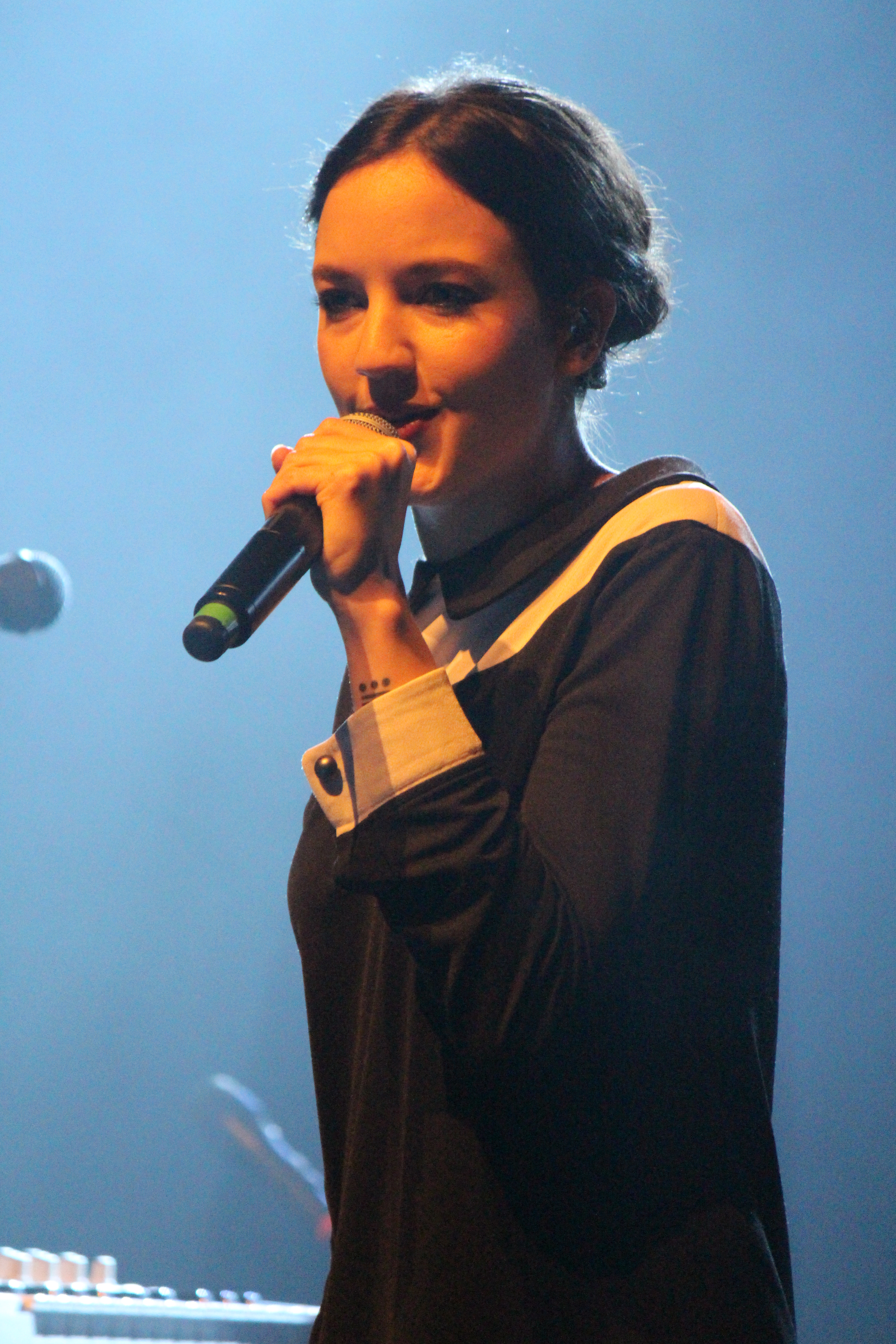 Jain aux Rendez-Vous Soniques 2015